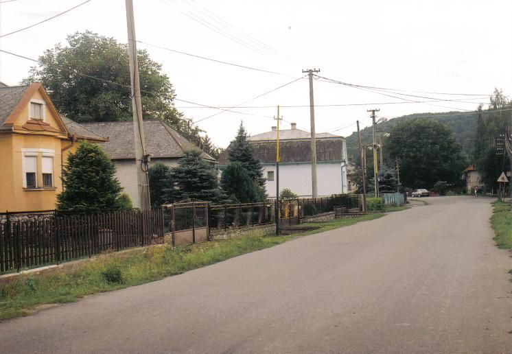 Pohľad na hornú časť obce Vyšný Hrušov smerom k škole